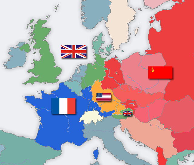 Besatzungszonen in Deutschland und Österreich und quasi die Teilung Europas